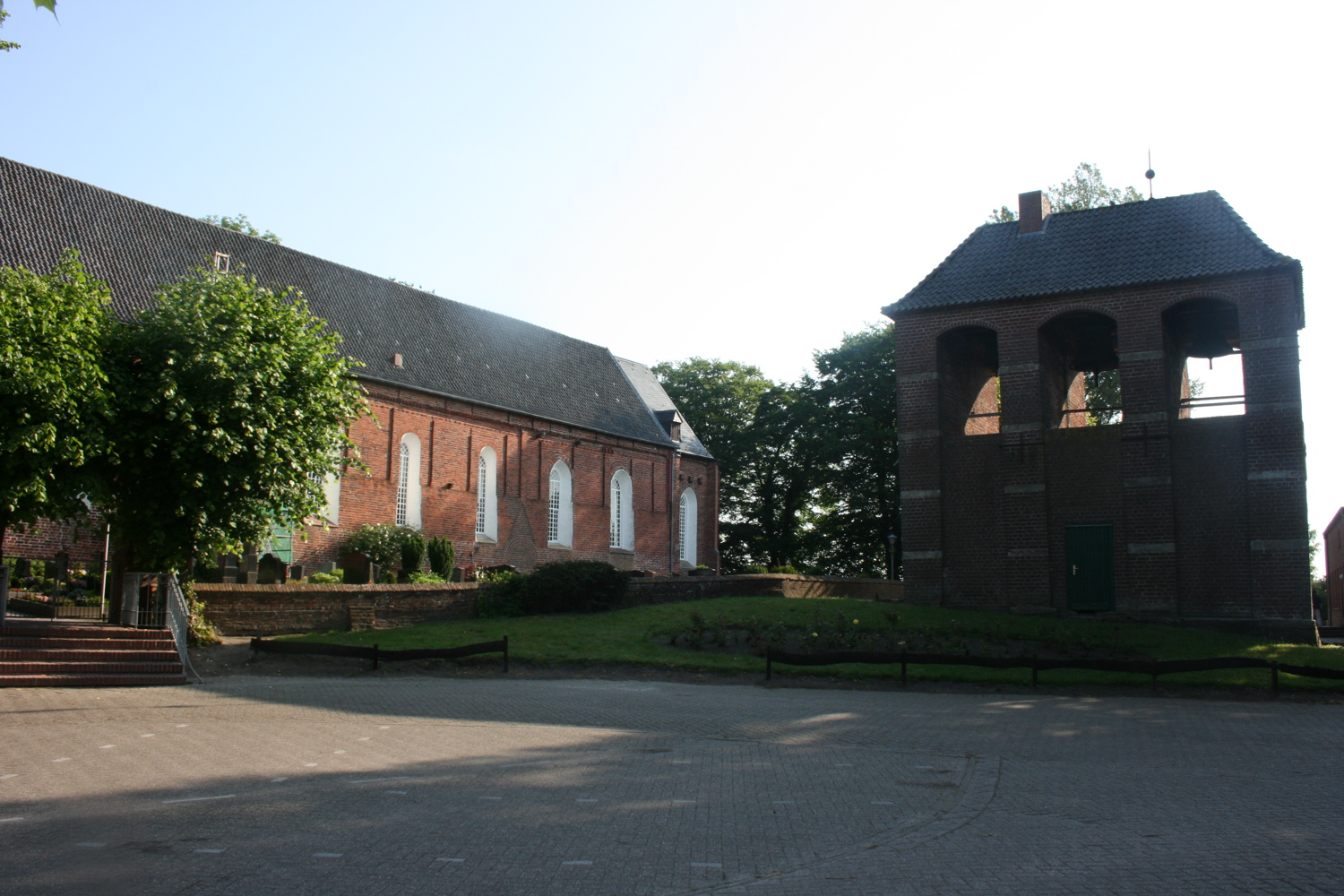 Kreisbahn Aurich Gesamtansicht der Kirche Victorbur